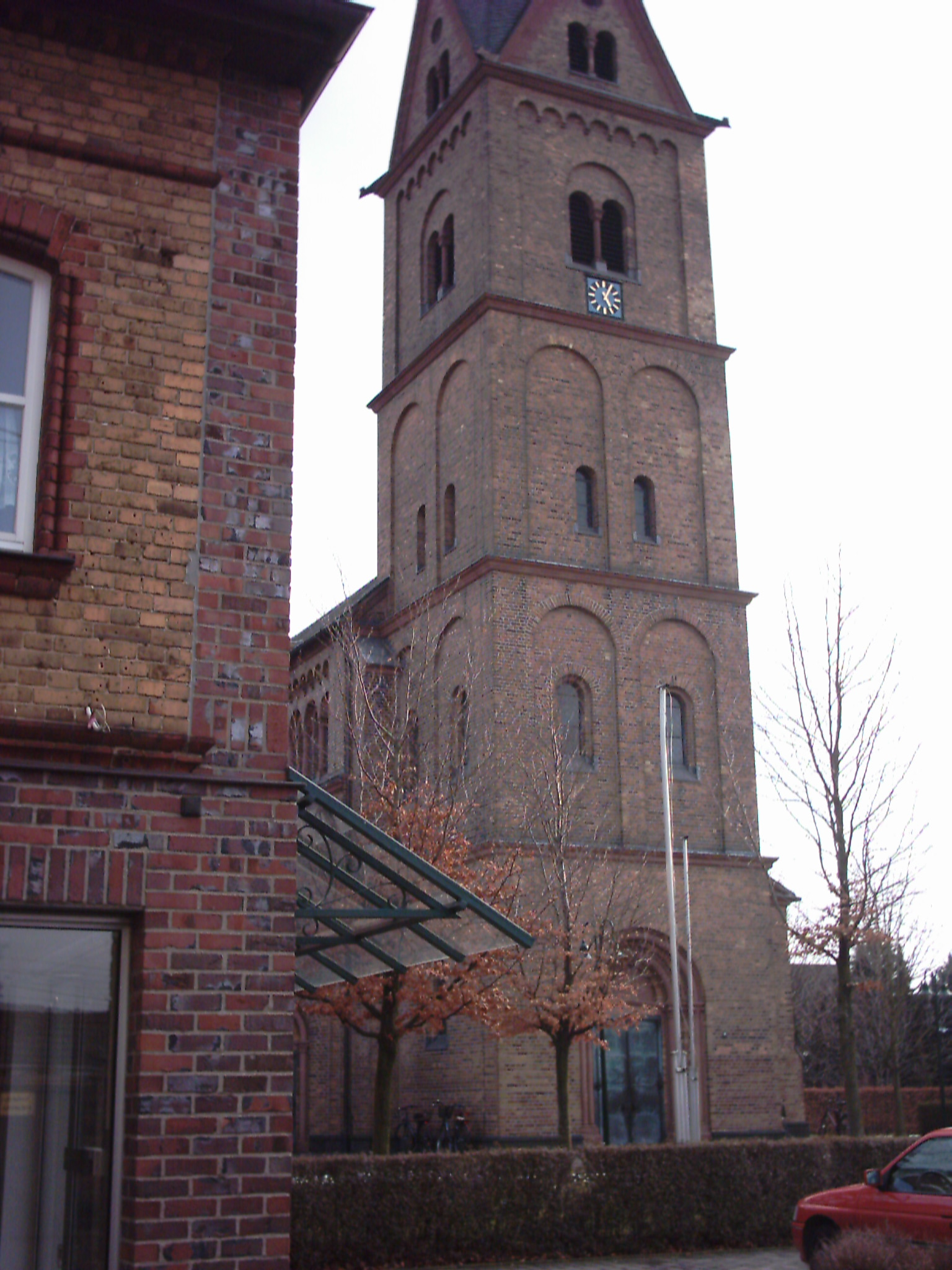 Katholische Kirche St. Augustinus in der Altstadt von Menden, Sankt Augustin